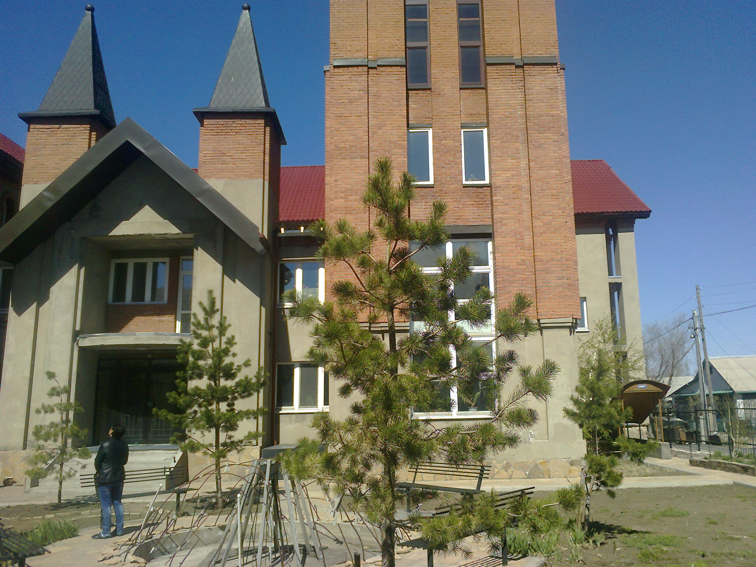 Собор Святого Иосифа (Караганда)